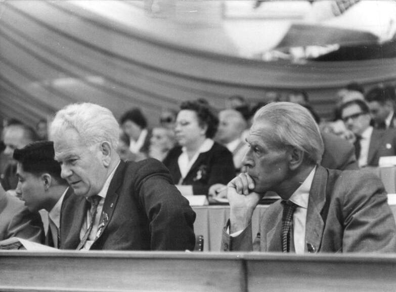 Zentralbild Heilig 10.7.1958. V. Parteitag der SED vom 10. bis 16.7.1958 in der Werner-Seelenbinder-Halle, Berlin, 1. Tag: UBz.: Im Präsidium während des Referats von Walter Ulbrich (Rechts): Max Reimann, Erster Sekretär des ZK der KPD und Hermann Matern, Mitglied des Politbüros des ZK der SED.